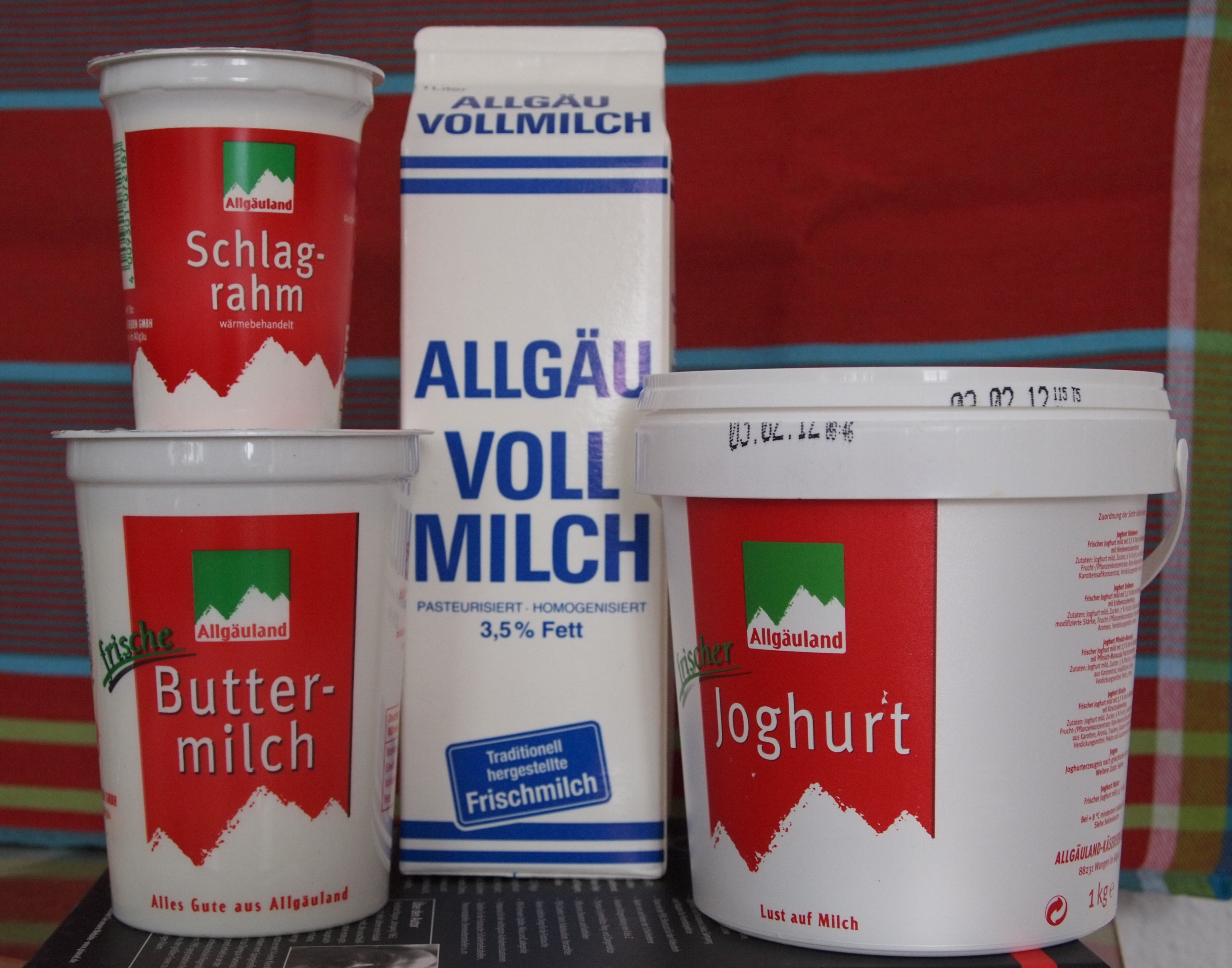 Joghurt, Vollmilch, Buttermilch und Schlagrahm aus der zum 31.1.2012 eingestellten "Weissen Linie" (Frischmilchprodukte) der Allgäuland-Käsereien GmbH Wangen im Allgäu